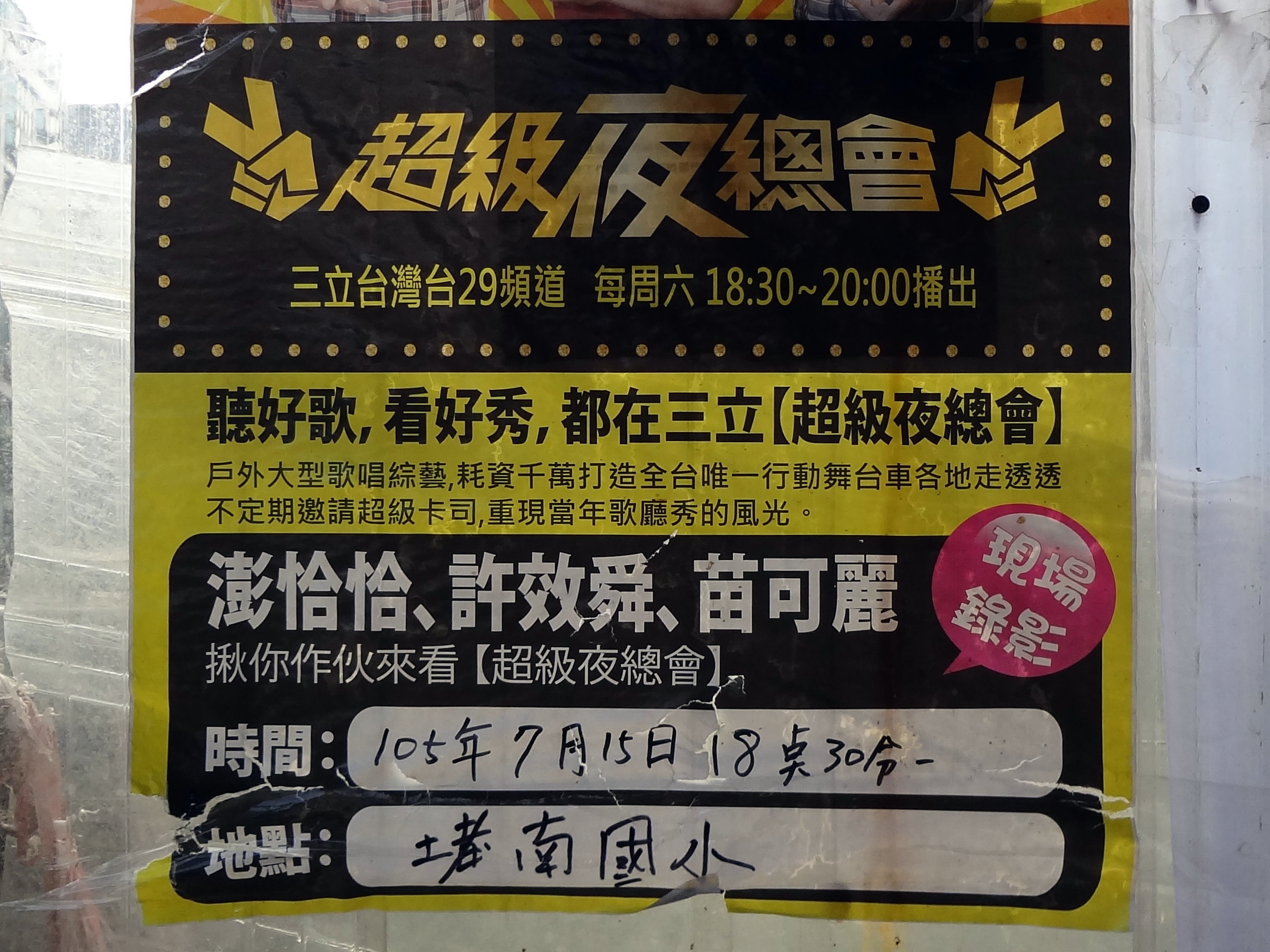 三立台灣台綜藝節目《超級夜總會》於2016年（中華民國105年）7月15日18點30分於基隆市七堵區堵南國民小學現場錄影，此為基隆市七堵區百六街某檳榔攤前張貼的宣傳海報下半部。